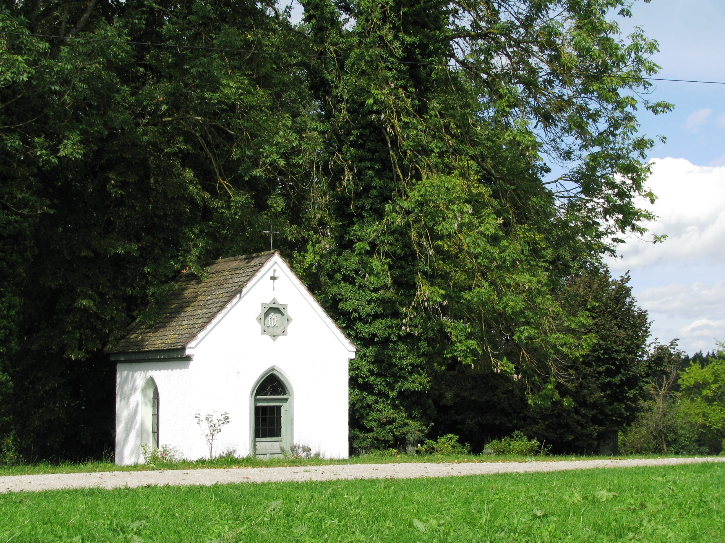 Hofkapelle eines landwirtschaftlichen Anwesens in Adelsreuth, Gemeinde Eurasburg; Satteldachbau mit dreiseitigem Chorschluss, 3. Viertel 19. Jh. This is a photograph of an architectural monument.